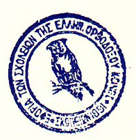 Печат на гръцкото училище в Скопие